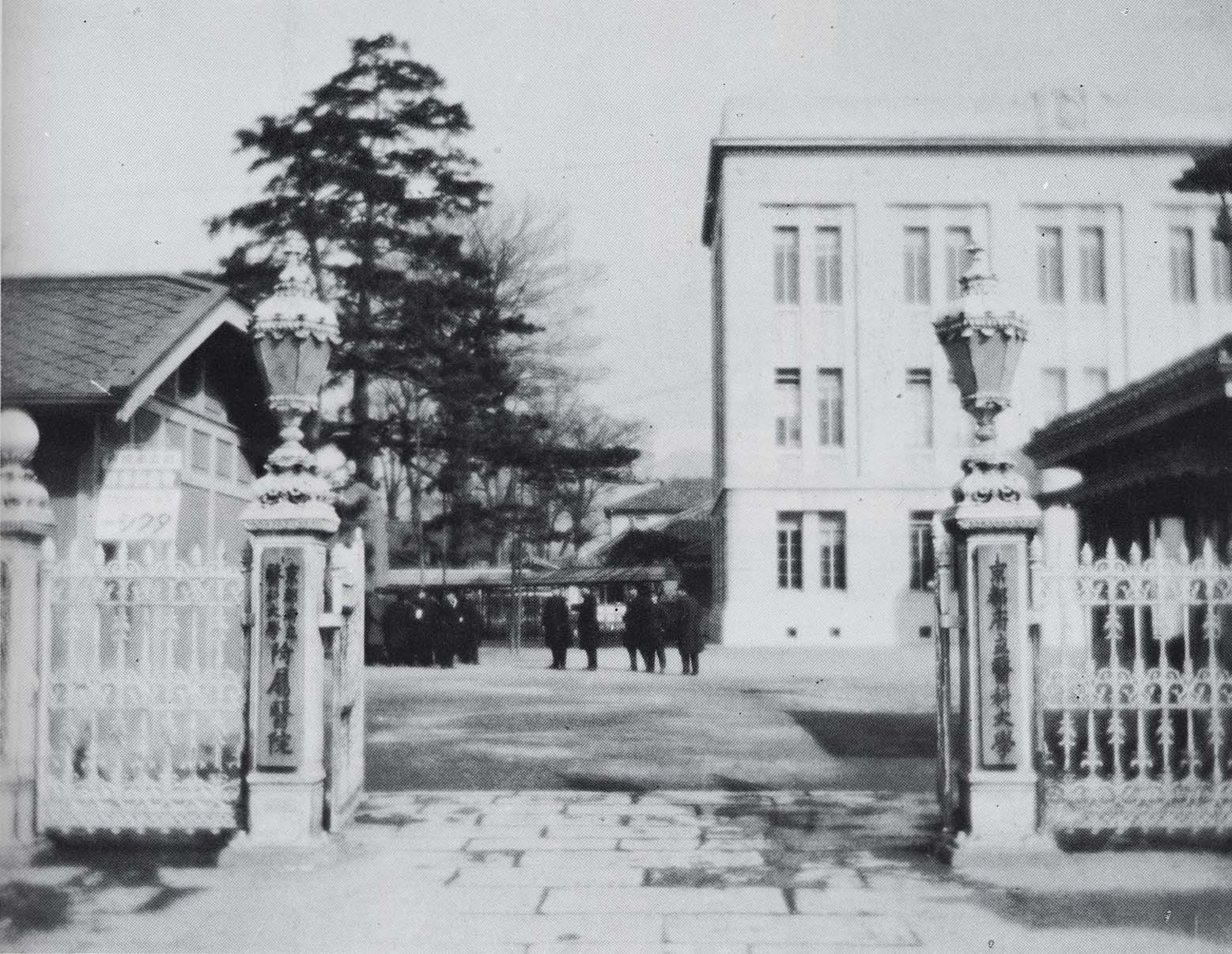 京都府立医科大学正門